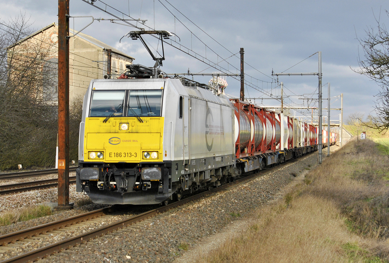 ECR France E186 313